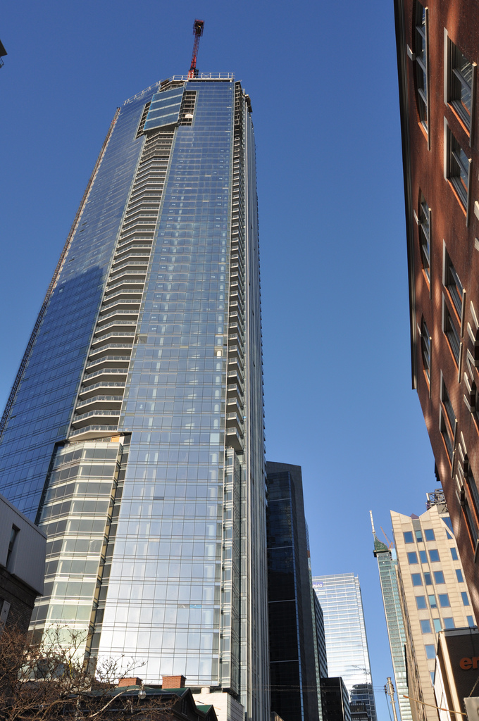 March 11, 2012